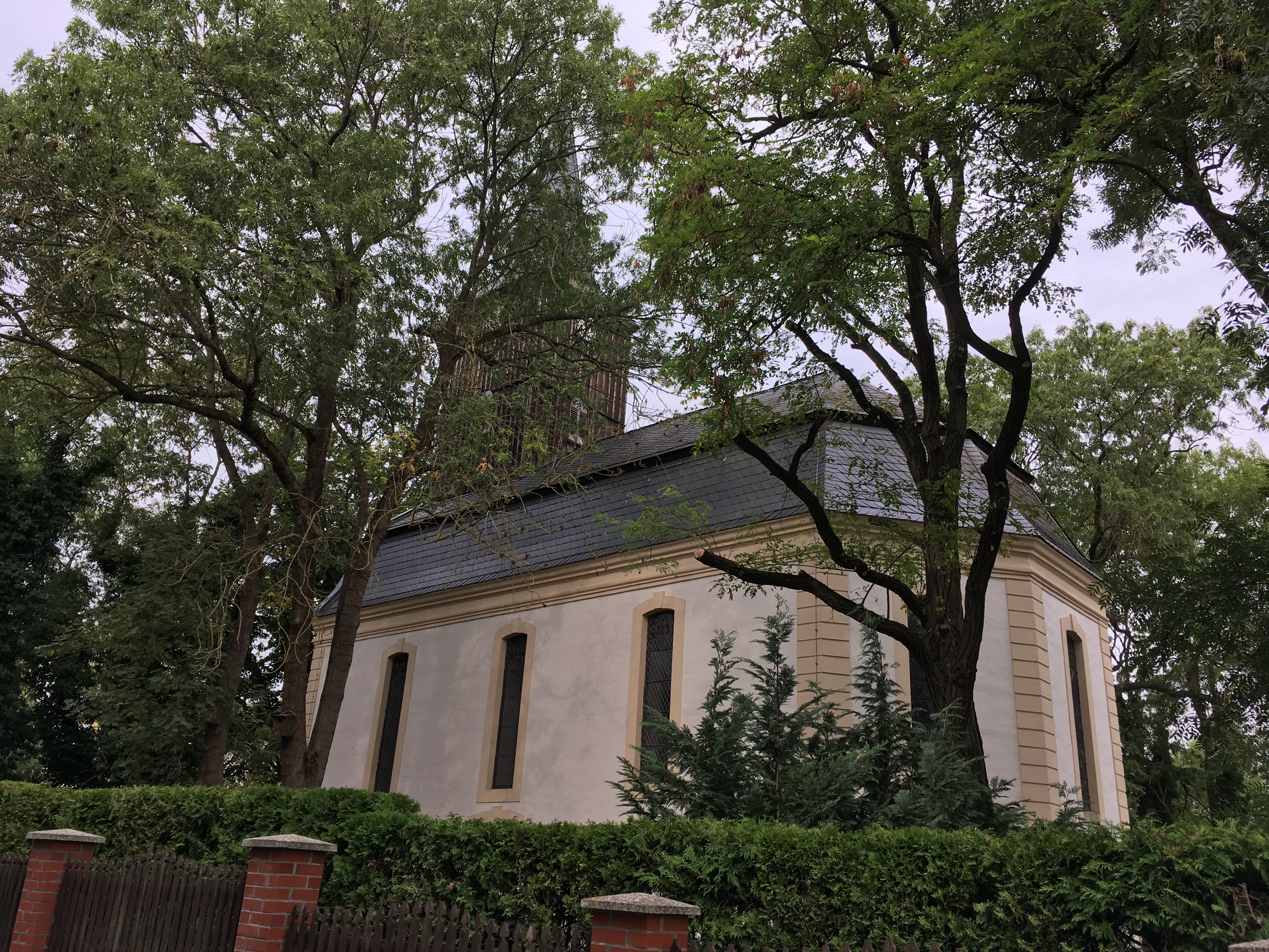 Die Saalkirche in Schenkenberg entstand im Kern im Jahr 1685 und wurde bei einem Brand im Jahr 1900 weitgehend zerstört. Anschließend errichtete die Kirchengemeinde das Bauwerk neu auf; es wurde um 2000 restauriert.